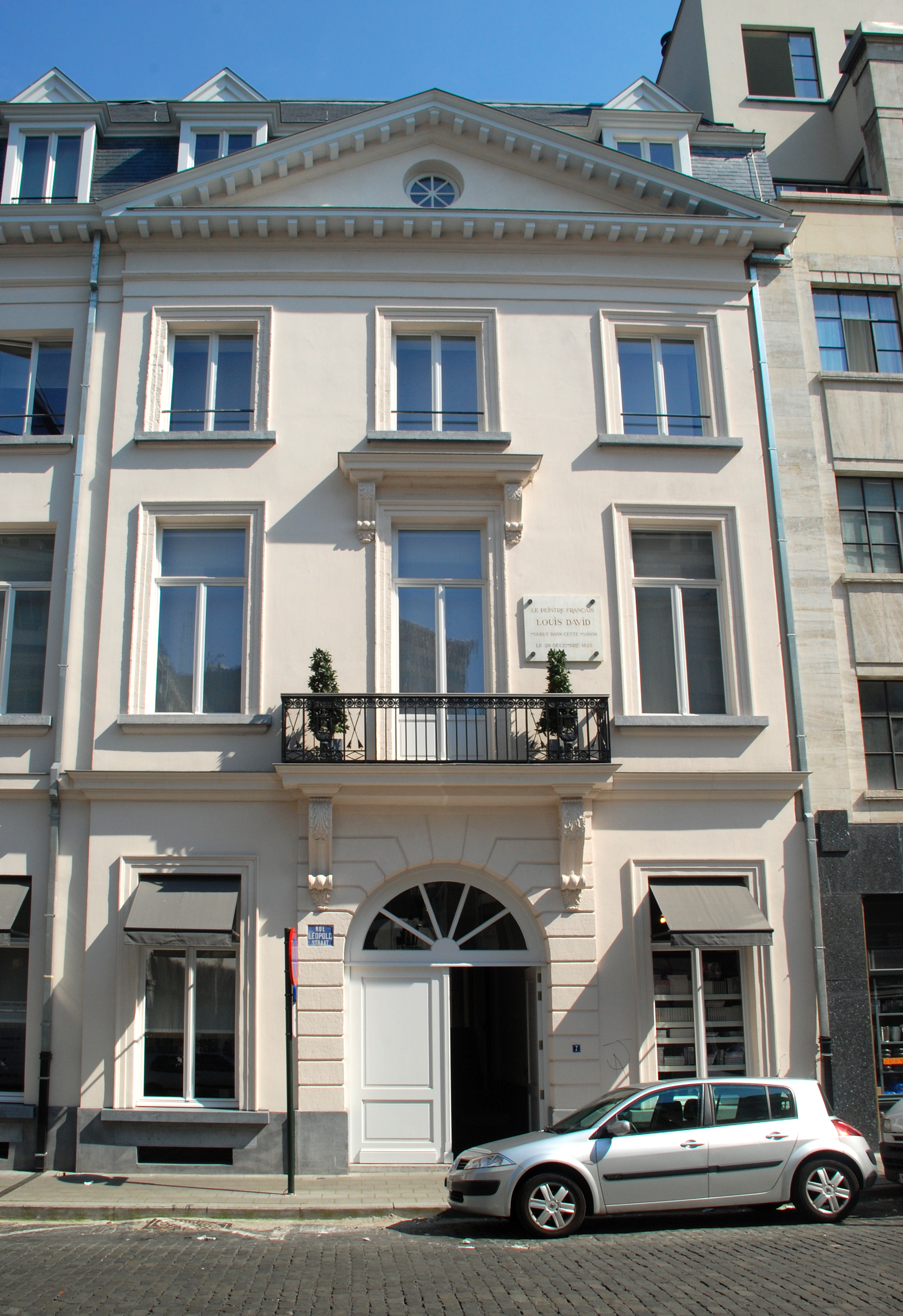 Belgique - Bruxelles - Maison de Jacques-Louis David, 7 rue Léopold